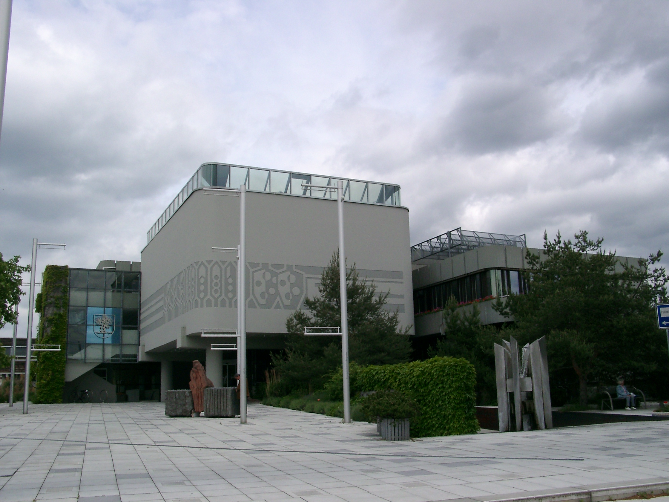 Walldorf (Baden), Rathaus